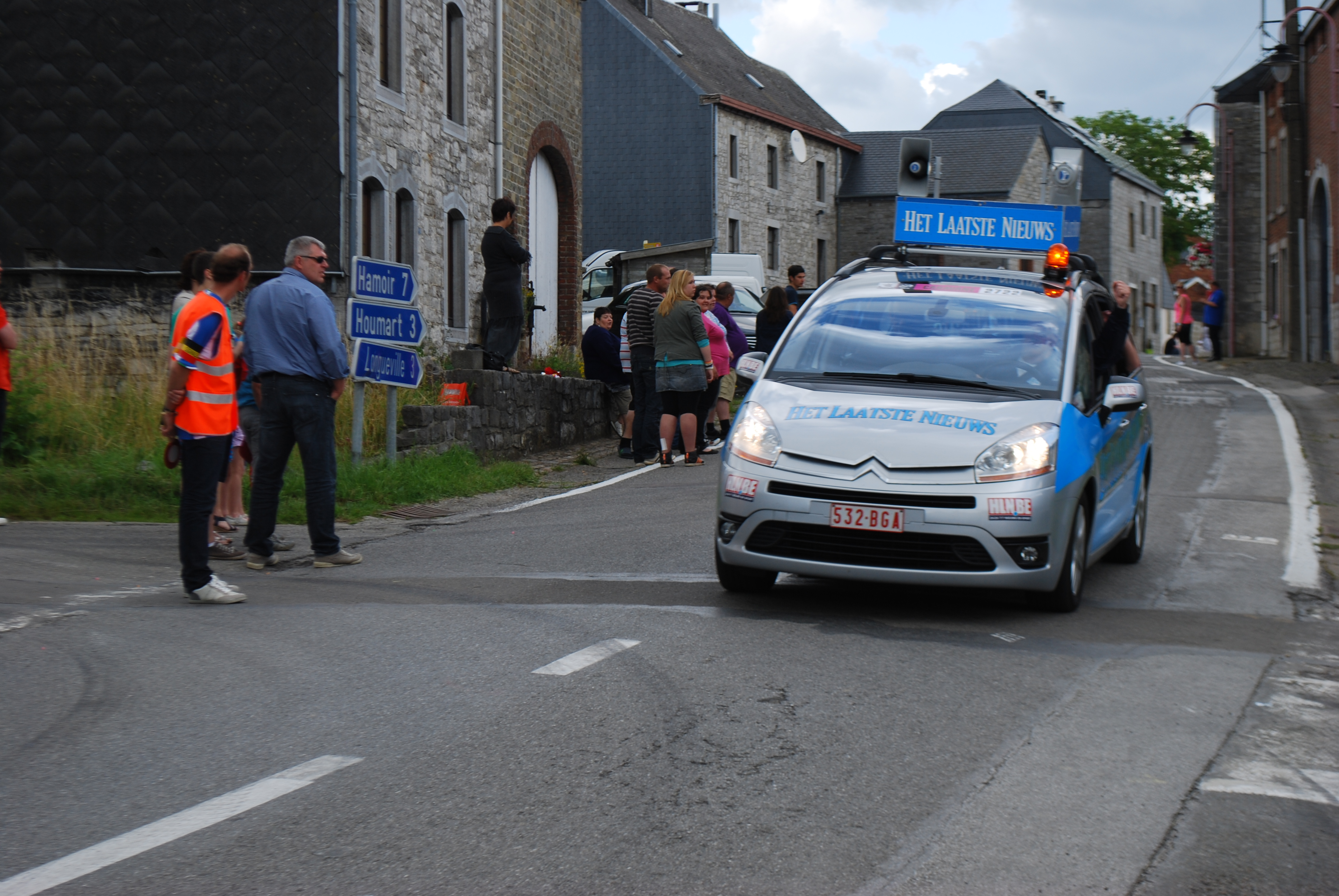 Vue du passage du Tour de France à Tohogne (Durbuy).